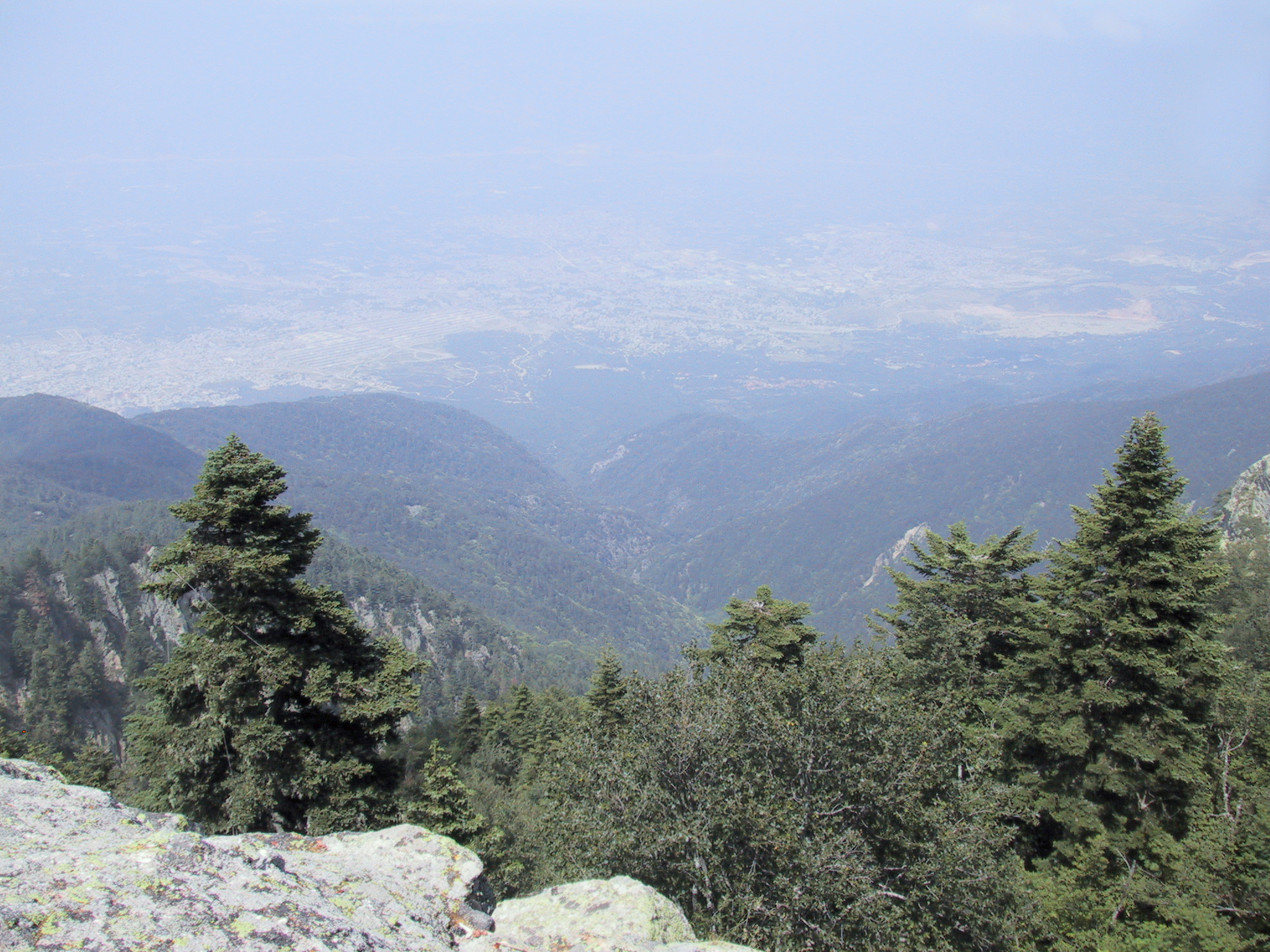 L'Uludag est une montagne qui culmine à 2490 mètres, juste à côté de la ville de Bursa. La région est aussi un parc national. Par ailleurs l'Uludag est un des plus grands et plus connus domaines skiables de Turquie. L'Uludag est facilement accessible à partir de Bursa, soit via la route (en voiture ou en dolmus) soit via un téléphérique (Teleferik). Trees are Abies nordmanniana subsp. bornmuelleriana